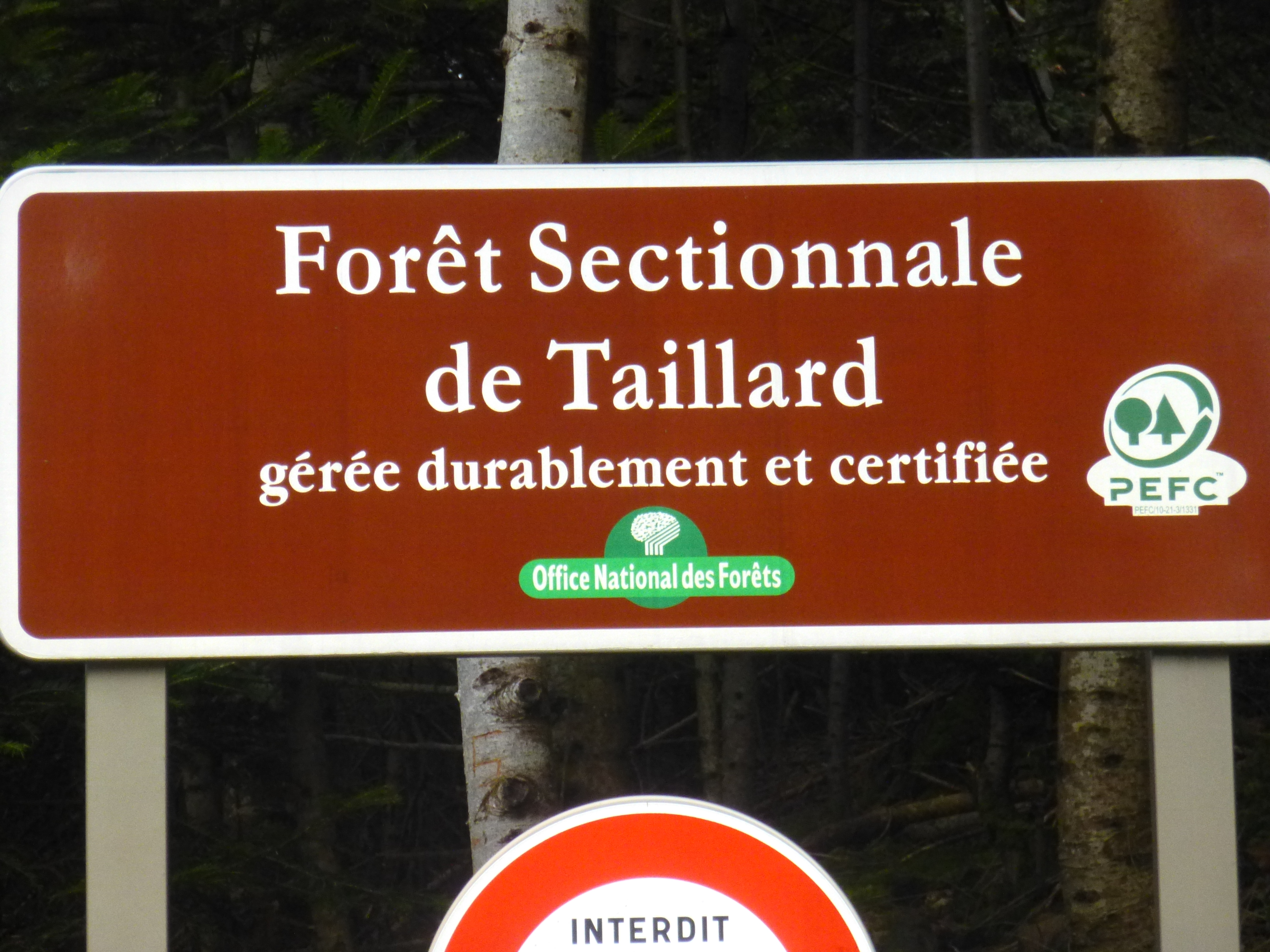 Panneau indiquant la forêt sectionnale de Taillard